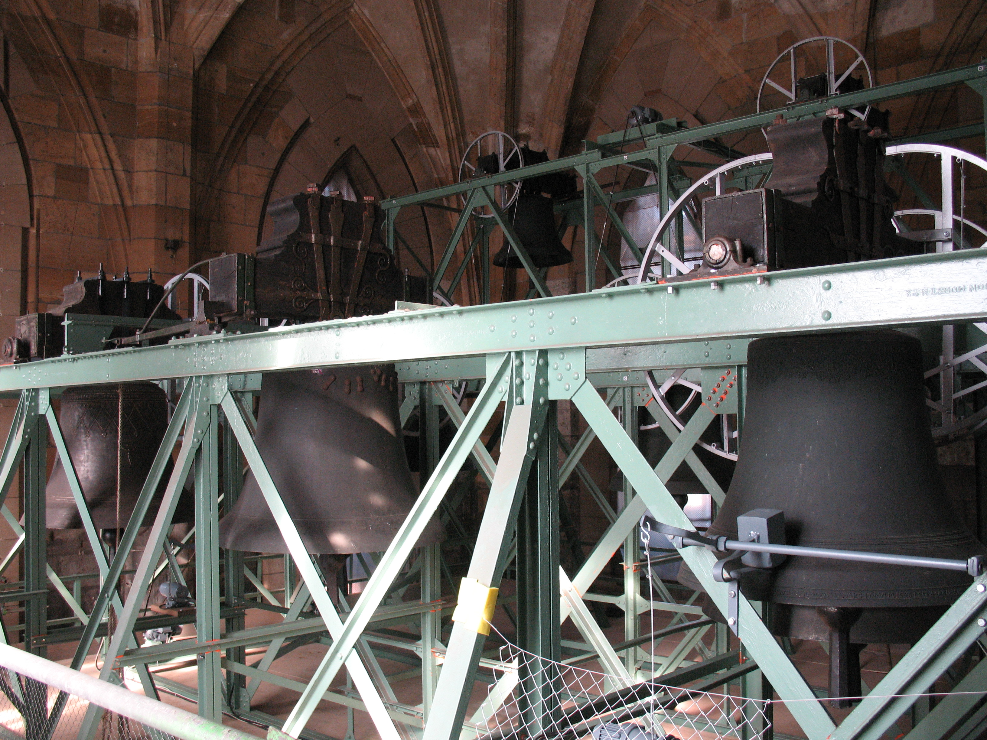 Sanierter Glockenstuhl des Ulmer Münsters. Im Bilde sind zu sehen: vorn rechts Leichenglocke (des'); vorn Mitte Schwörglocke (c'); vorn links Große Betglocke (c'); hinten oben links Taufglocke (b'); hinten unten Mitte Kleine Betglocke (es').